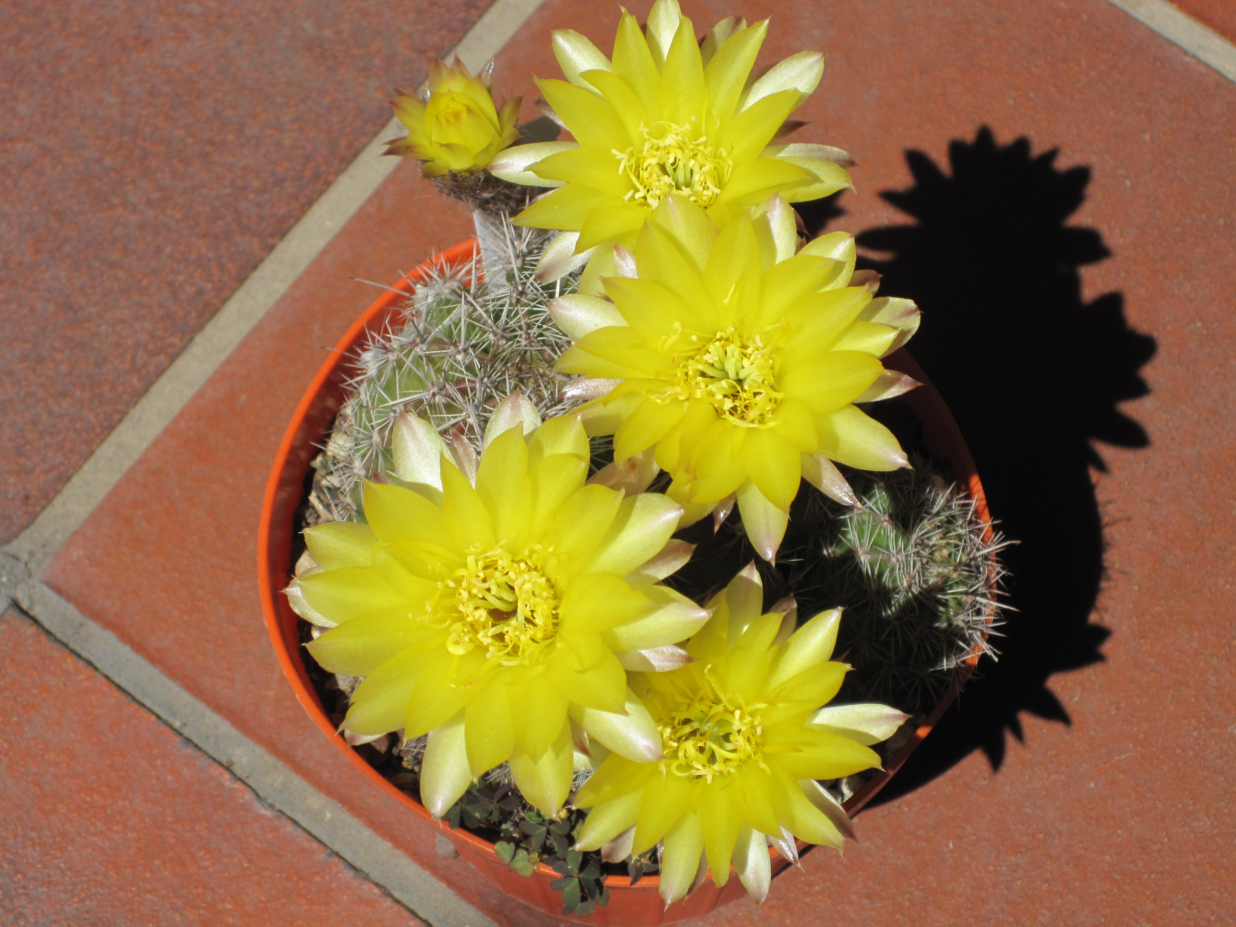 I fiori dell'echinopsis aurea